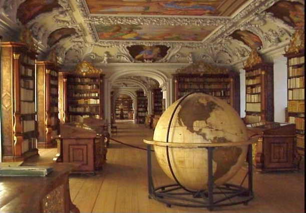 Bilder der Stiftsbibliothek Kremsmünster